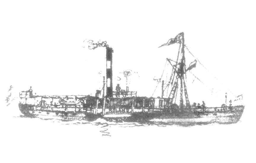 Gemälde des Dampfers Graf von Paris